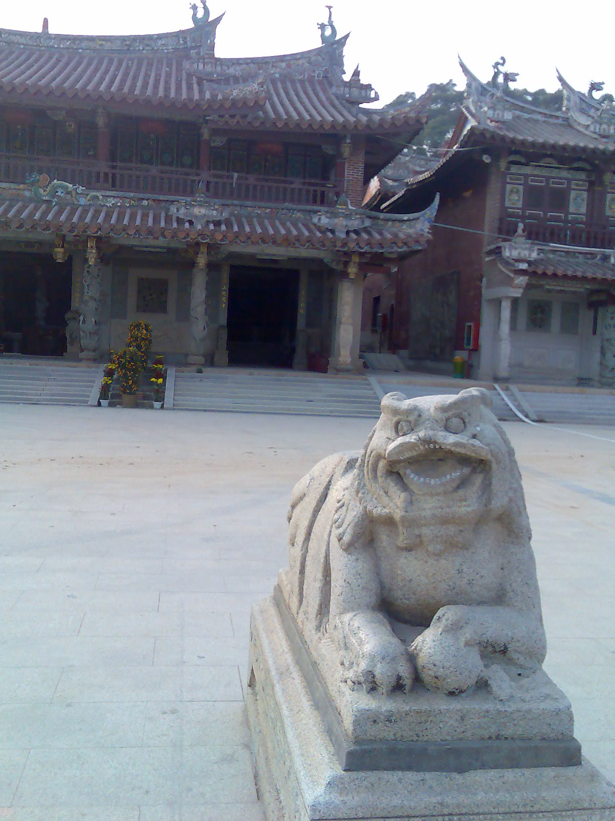 青礁慈济宫（东宫）註:作者本人摄于青礁慈济宫